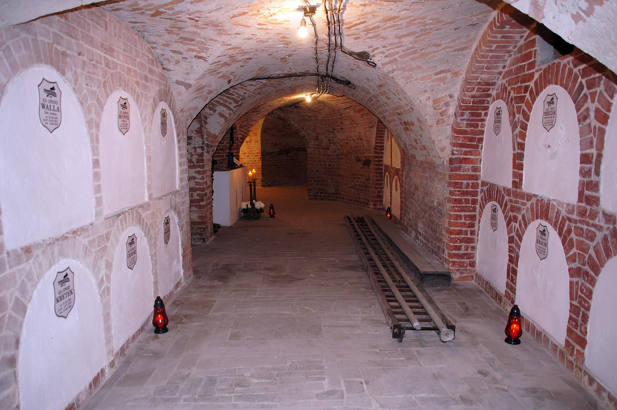 Wrocław, kościół p.w. Św. Trójcy, 1714-1715